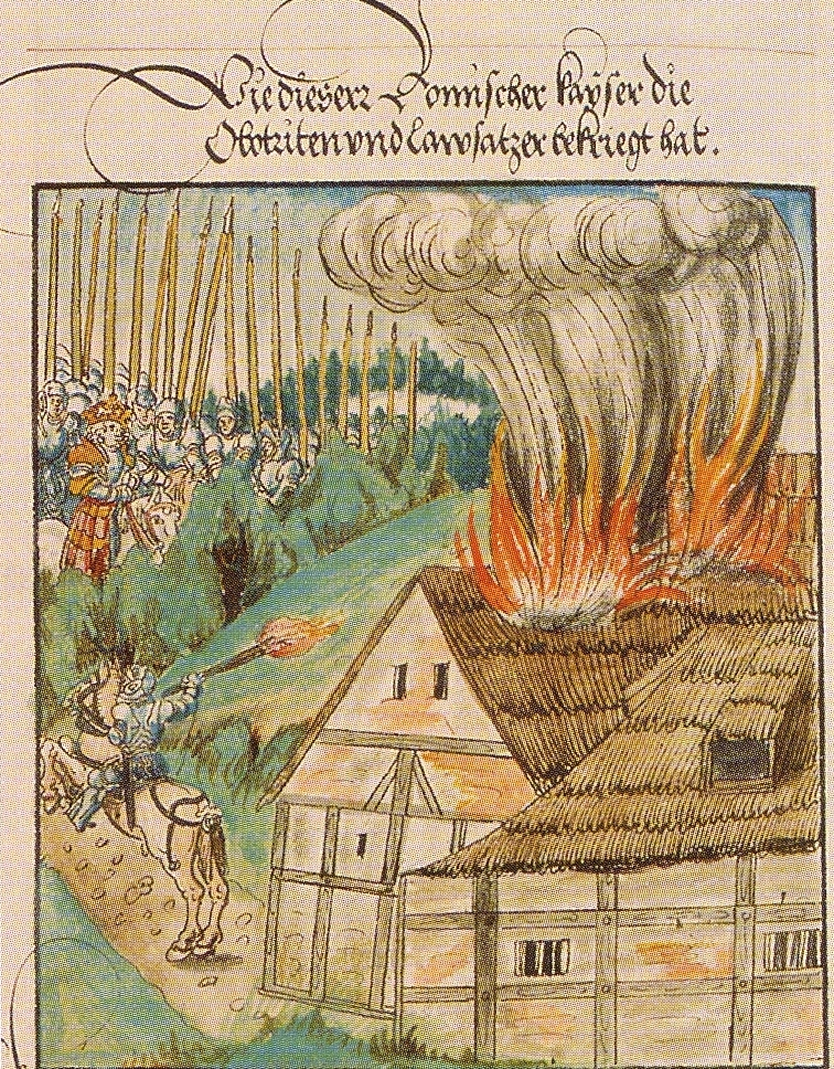 Verheerung des Slawenlandes 995 im Kriegszug Ottos III gegen Obotriten und Lutizen.